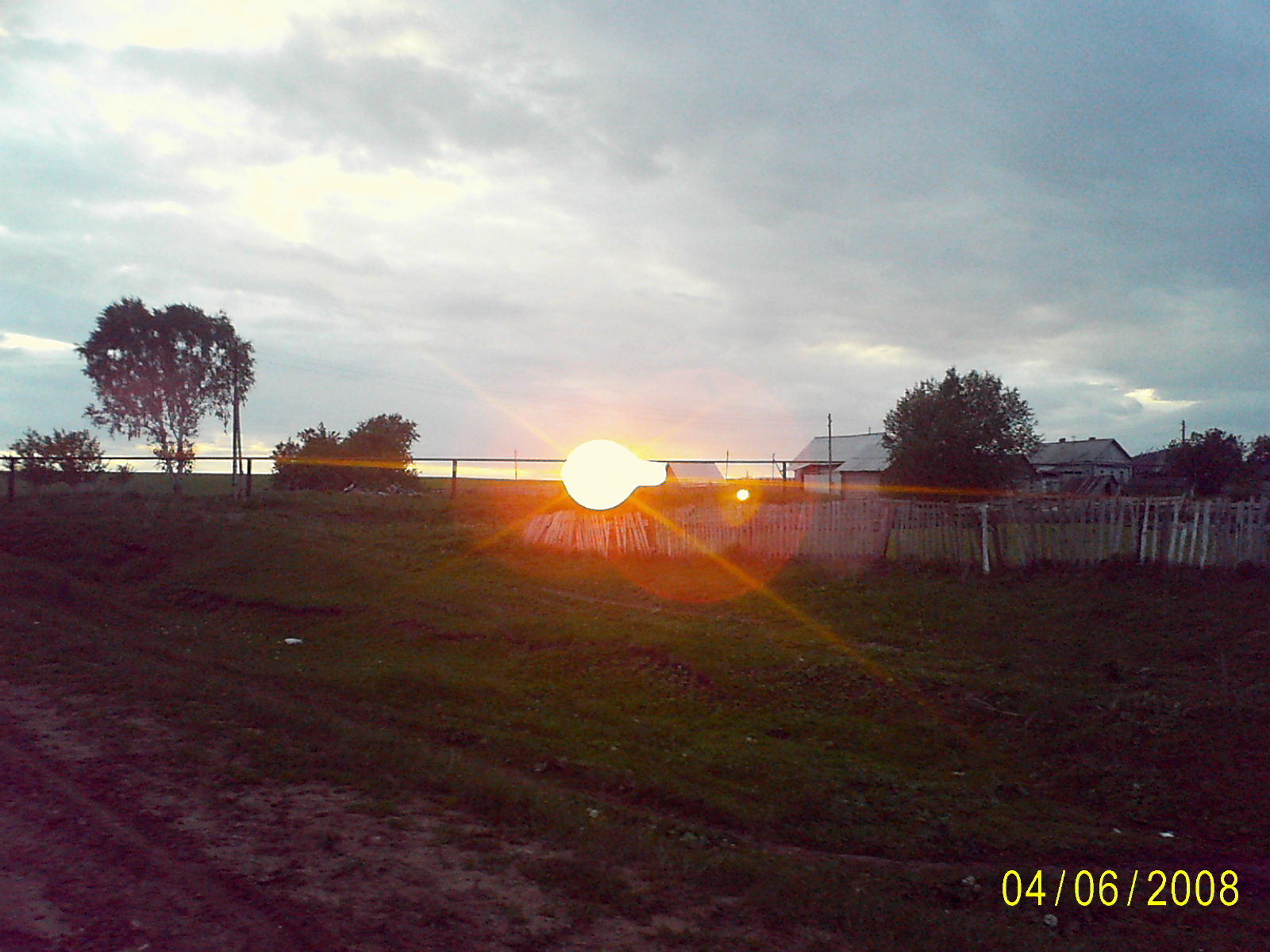 Старое Ильдеряково